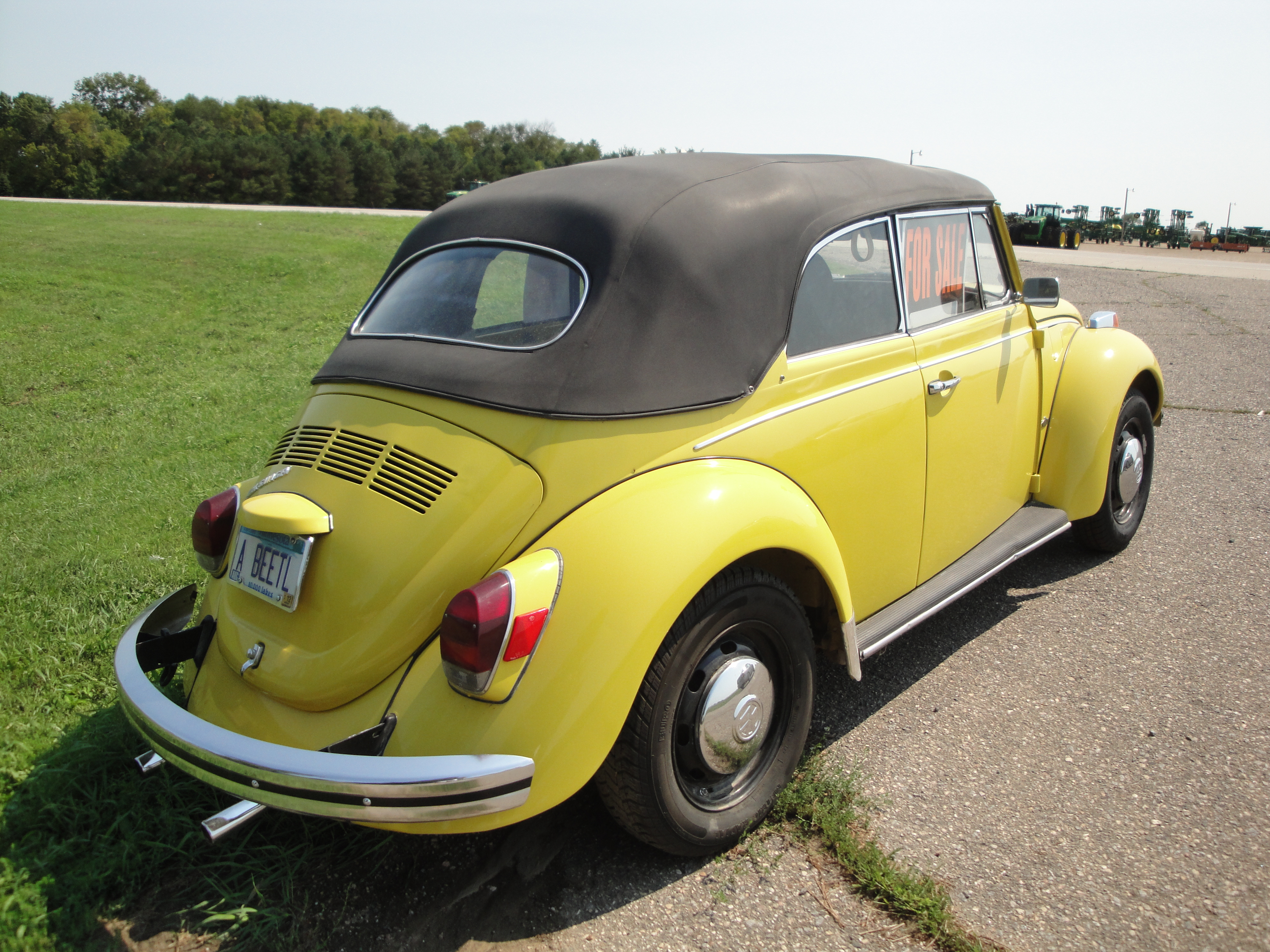 71 Volkswagen Beetle